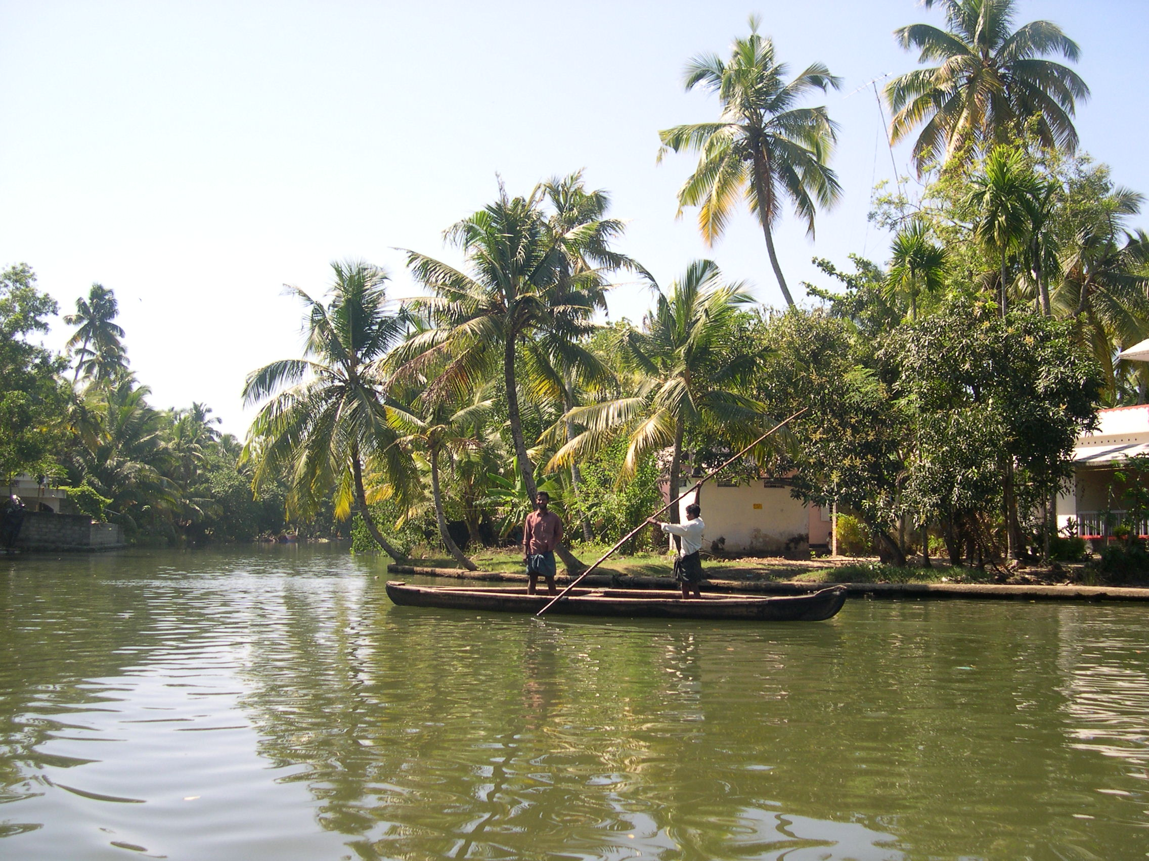 Backwaters of Kerala, India